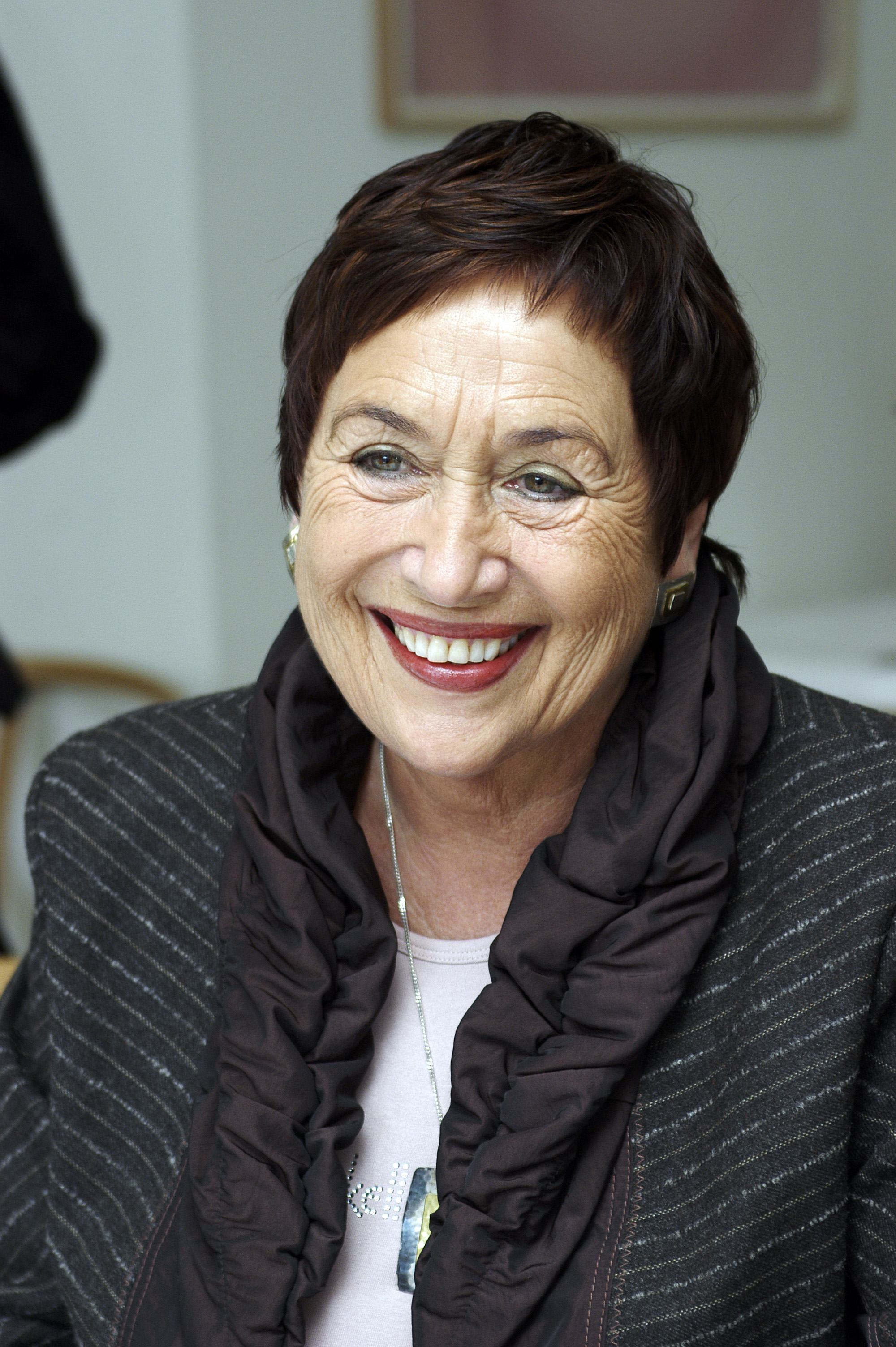 Rannveig Guðmundsdóttir, Nordiska rådets president 2005.